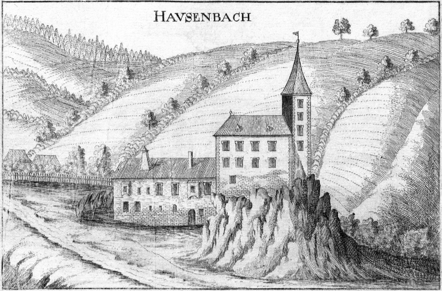 Alter Stich der Burg Hausenbach, Niederösterreich